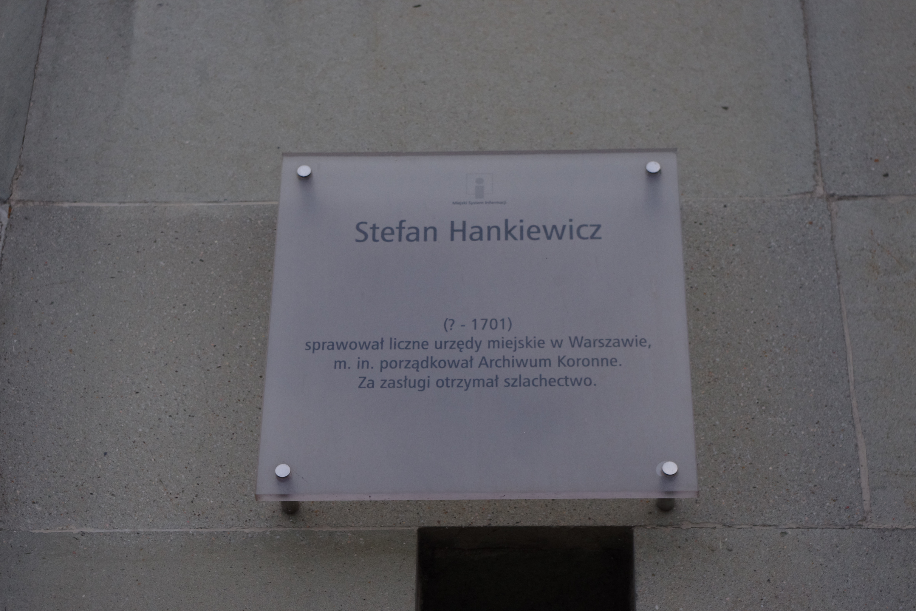 Tablica Miejskiego Systemu Informacji upamiętniająca metrykanta kancelarii wielkiej koronnej Stefana Kazimierza Hankiewicza, na ul. jego imienia w Warszawie